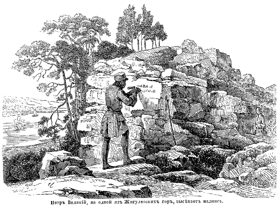 "Пётр Великий на одной из Жигулёвских гор высекает надпись" - скан из журнала 1845 года